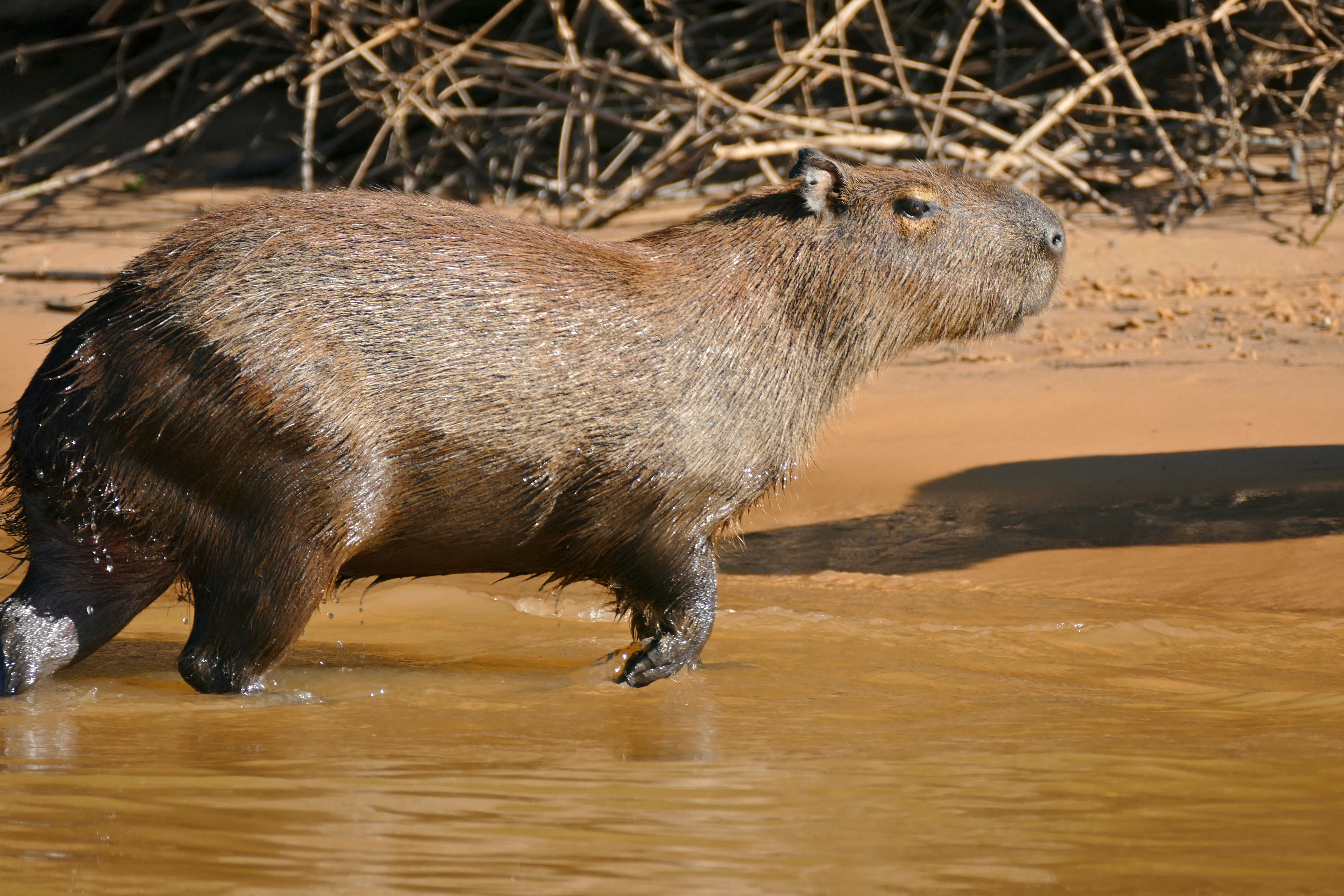 Rio São Lourenço, Porto Jofre Area, Pantanal, Poconé, Mato Grosso, BRAZIL